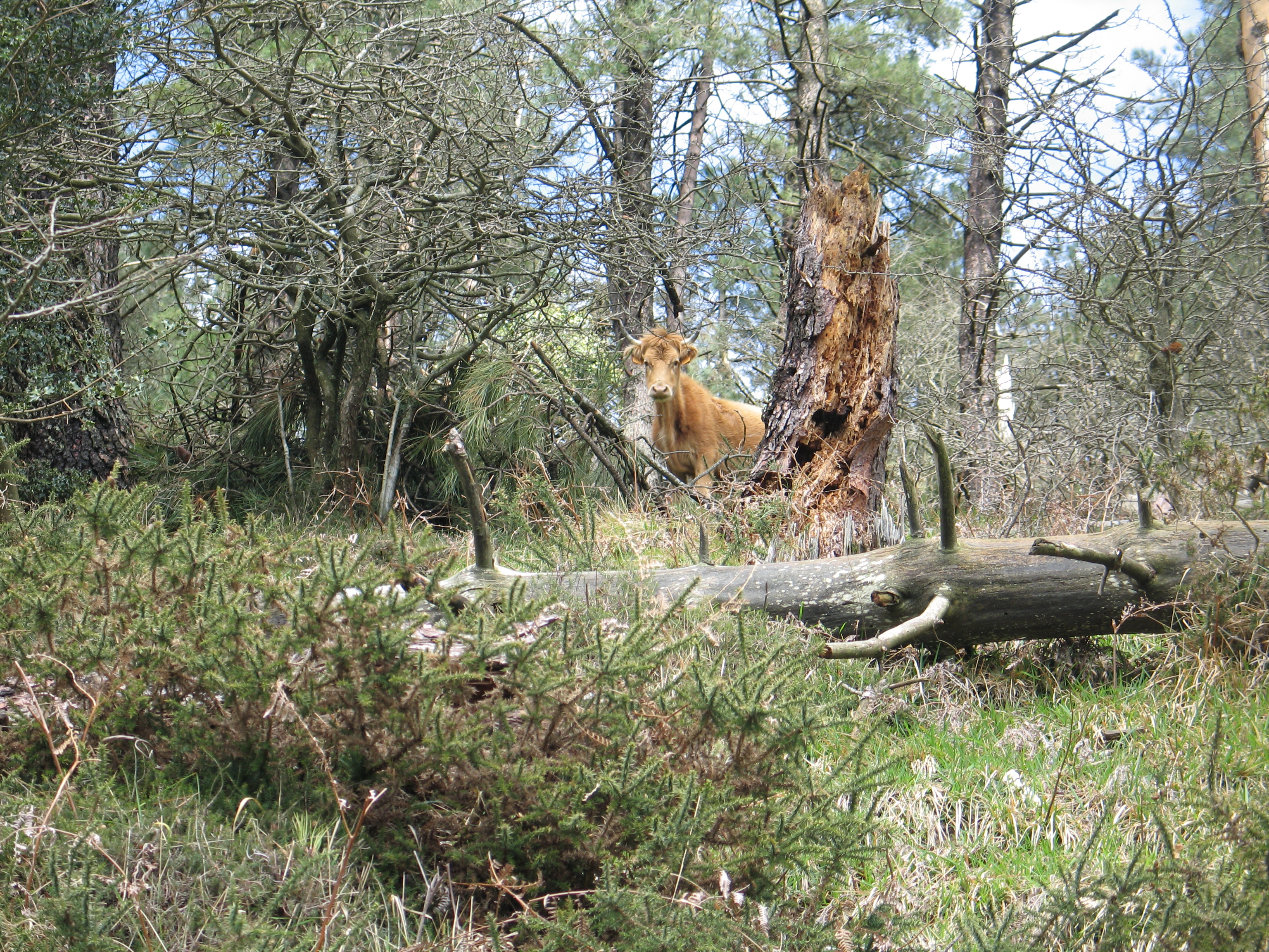 Betizu bat basoan